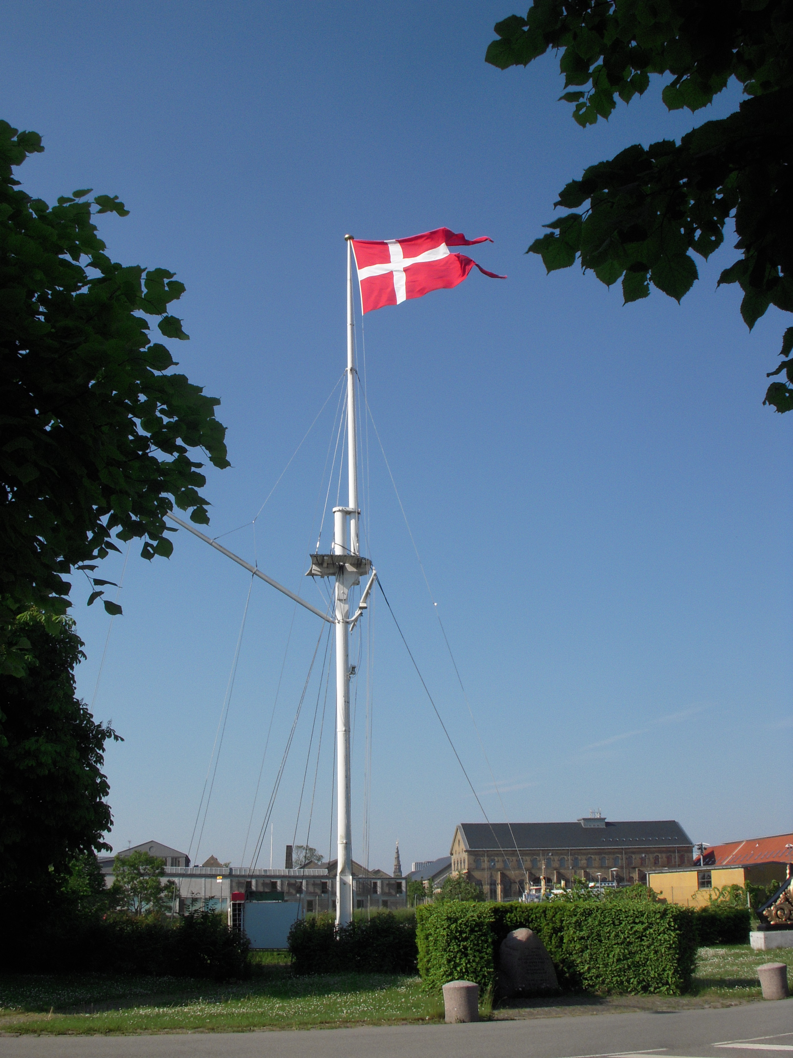 Parti fra Nyholm, Marinestation København. 30. maj 2011.